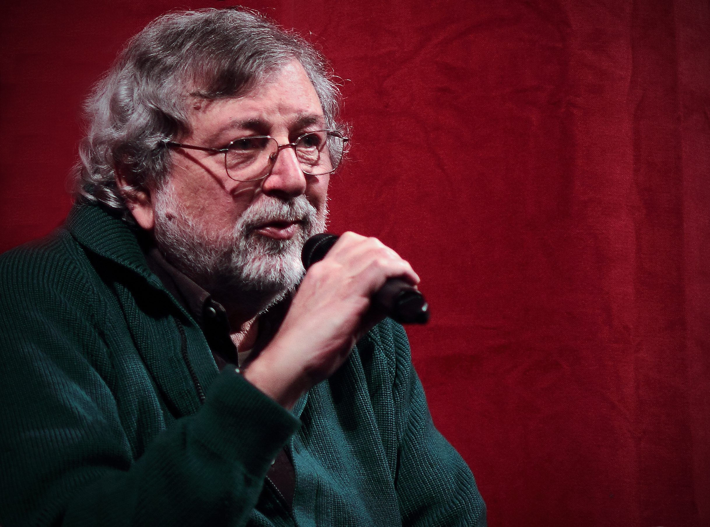 Francesco Guccini